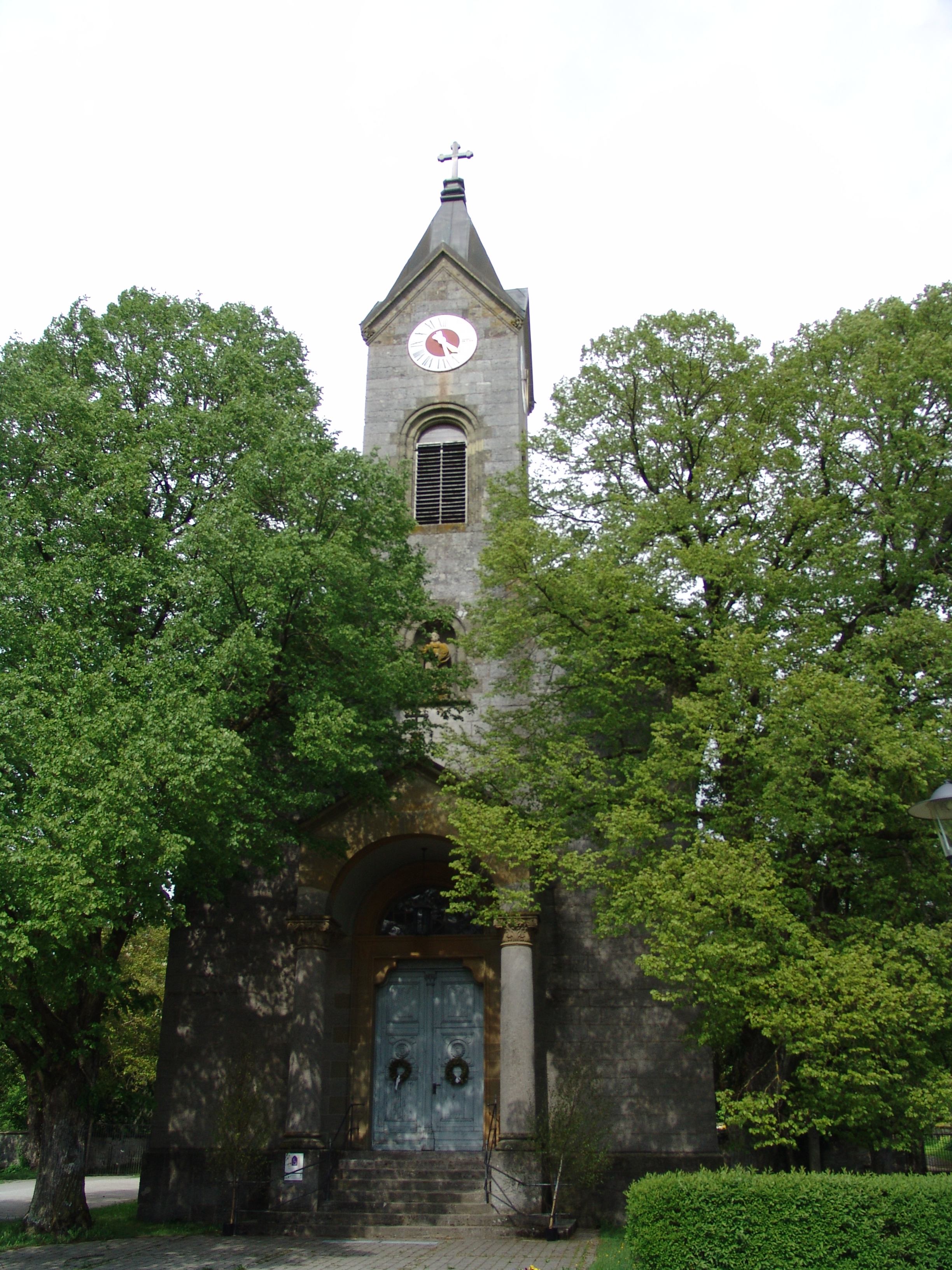 evang-luth. Kirche St. Veit in Oberoestheim